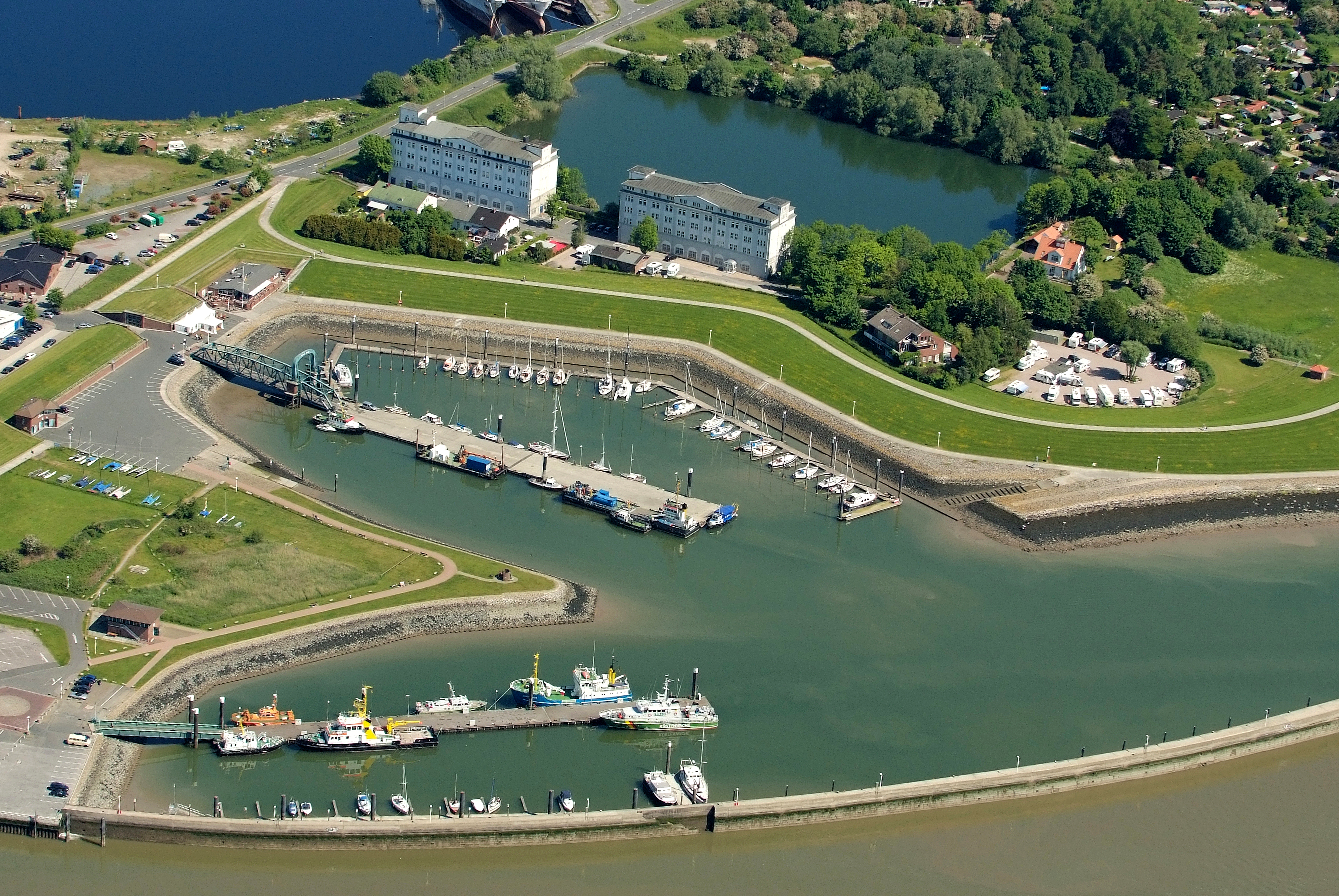 Pontonhafen bzw. Nassau-Hafen (Seglerhafen) mit Nassaubrücke in der Bildmitte, unten der Flut- oder Dienstehafen, Blick von Südwest Fotoflug vom Flugplatz Nordholz-Spieka über Cuxhaven und Wilhelmshaven